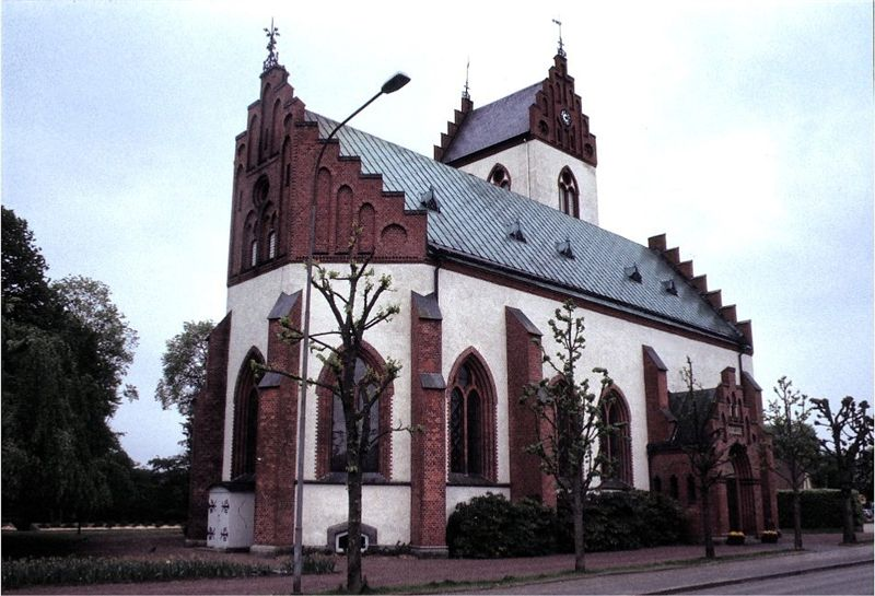 Hörby kyrka i Skåne, Sverige. Kirken set fra nordøst